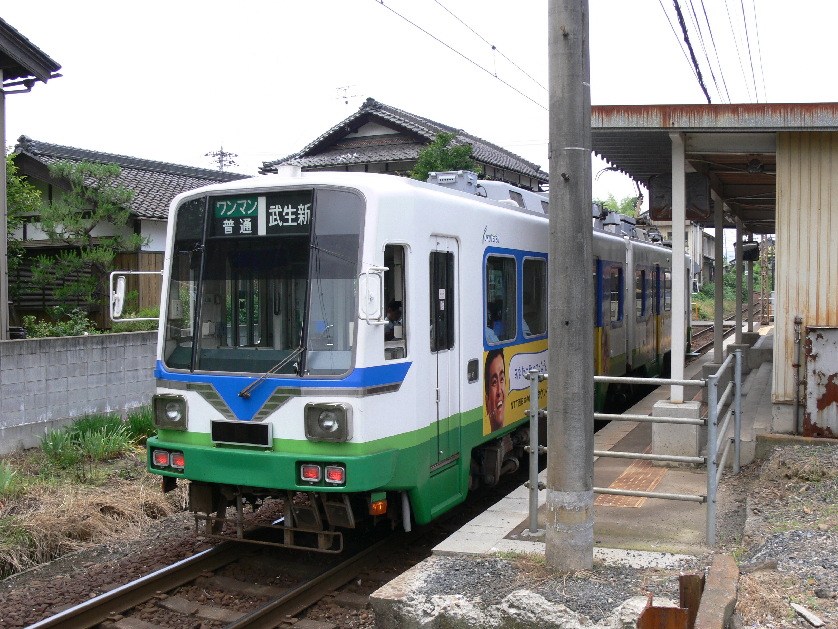 Fukutetsu 770 Series train at Tobanaka Station